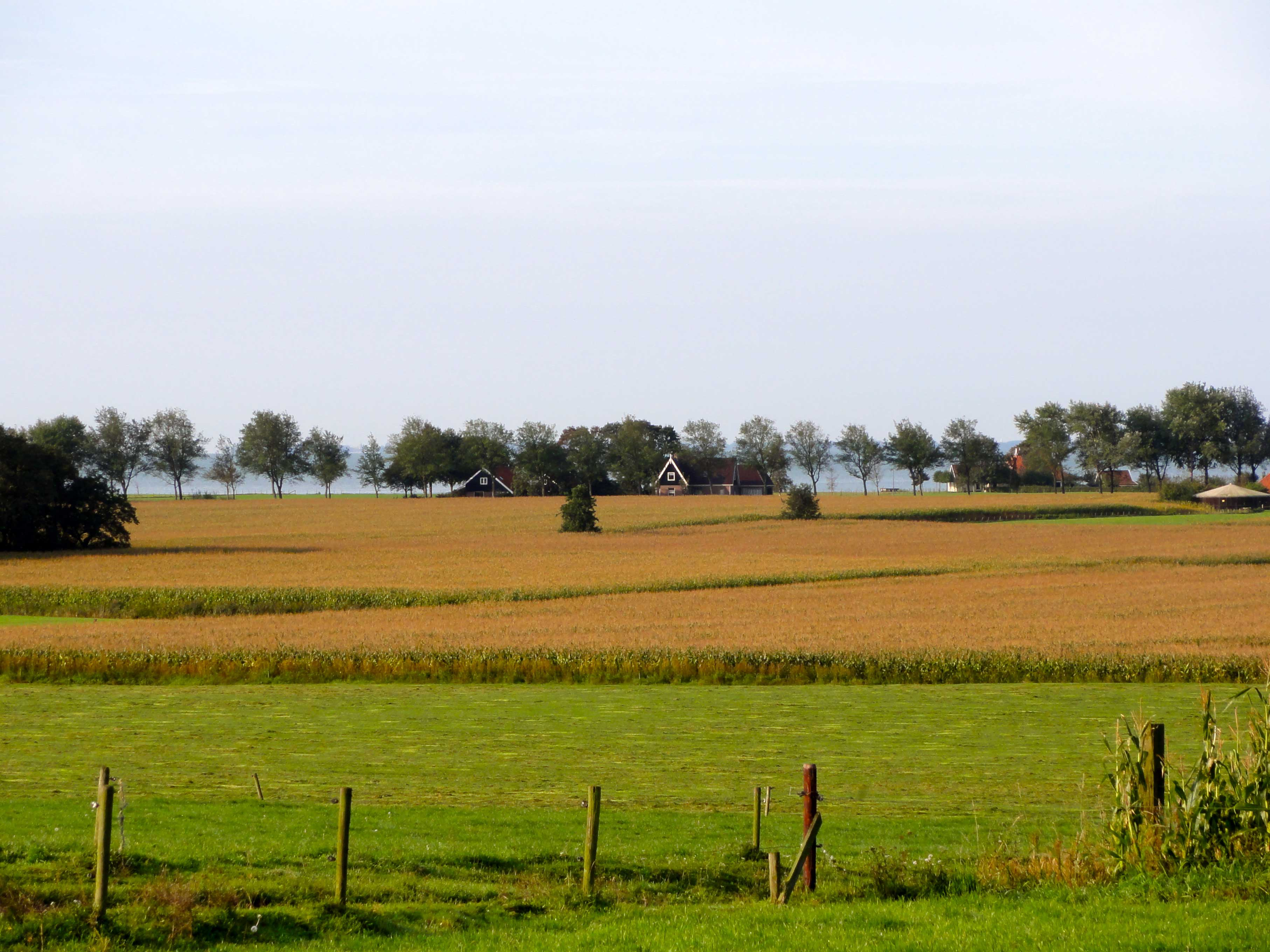 Gaasterland gezien vanaf het hoogste punt in de richting van het IJsselmeer